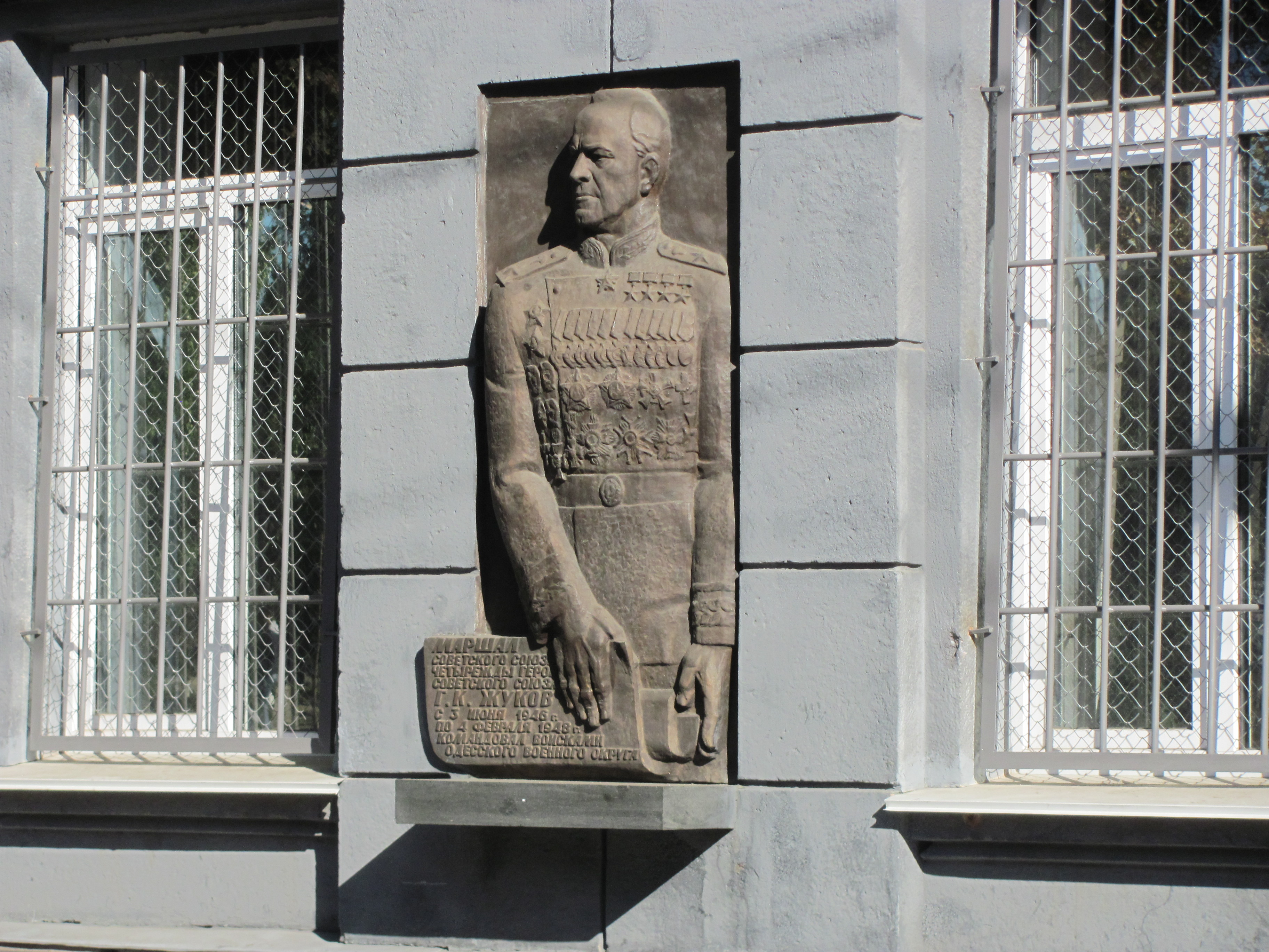 Пам’ятний знак на честь маршала Радянського Союзу Жукова Г.К.– командуючого ОдВО у 1946-1948 рр., Одеса, Пироговська вул., 6